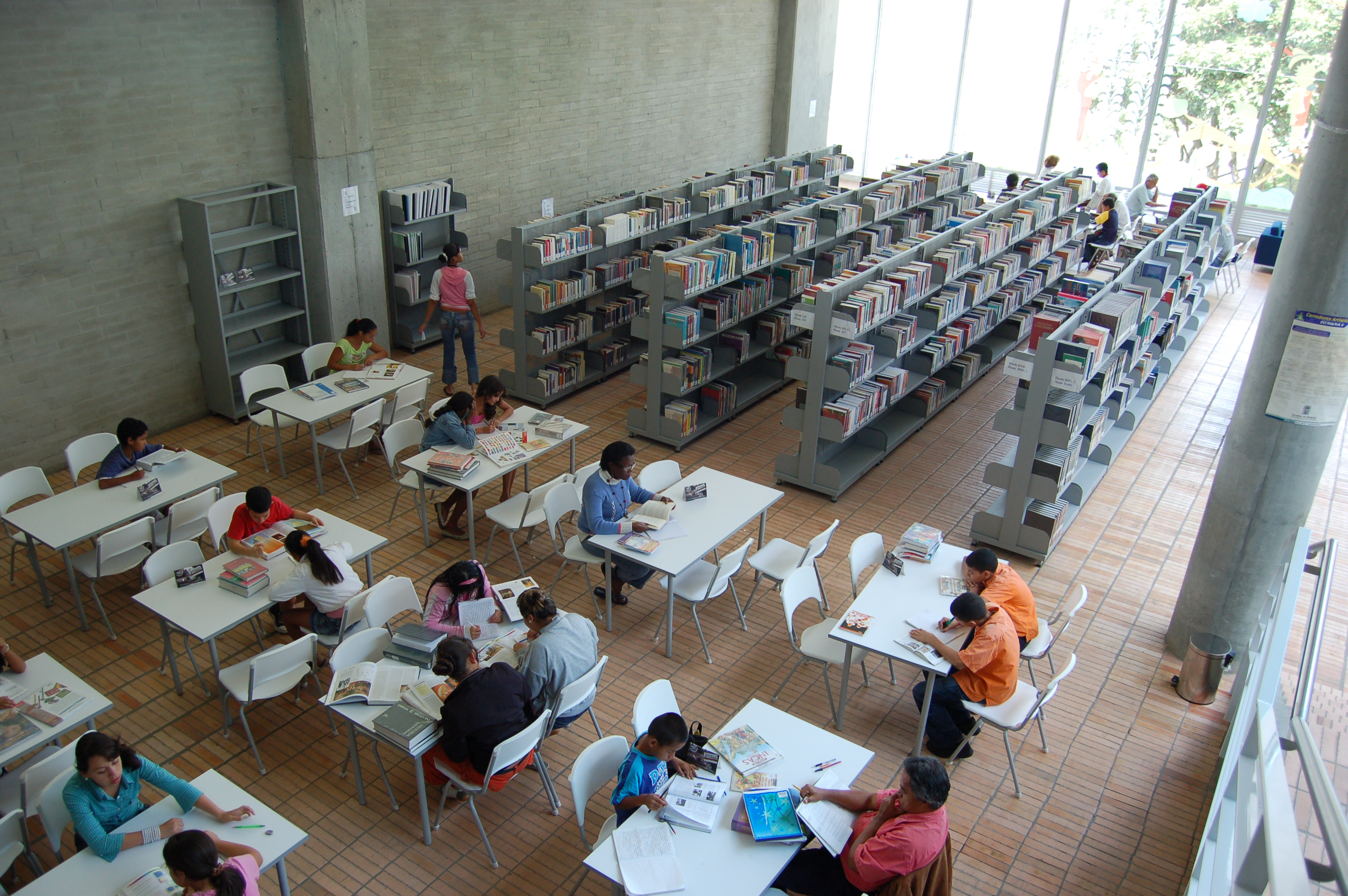 Biblioteca Tomás Carrasquilla, Medellín, Colombiadellin - Biblioteca T Carrasquilla - Comunas 6 y 7 - 12